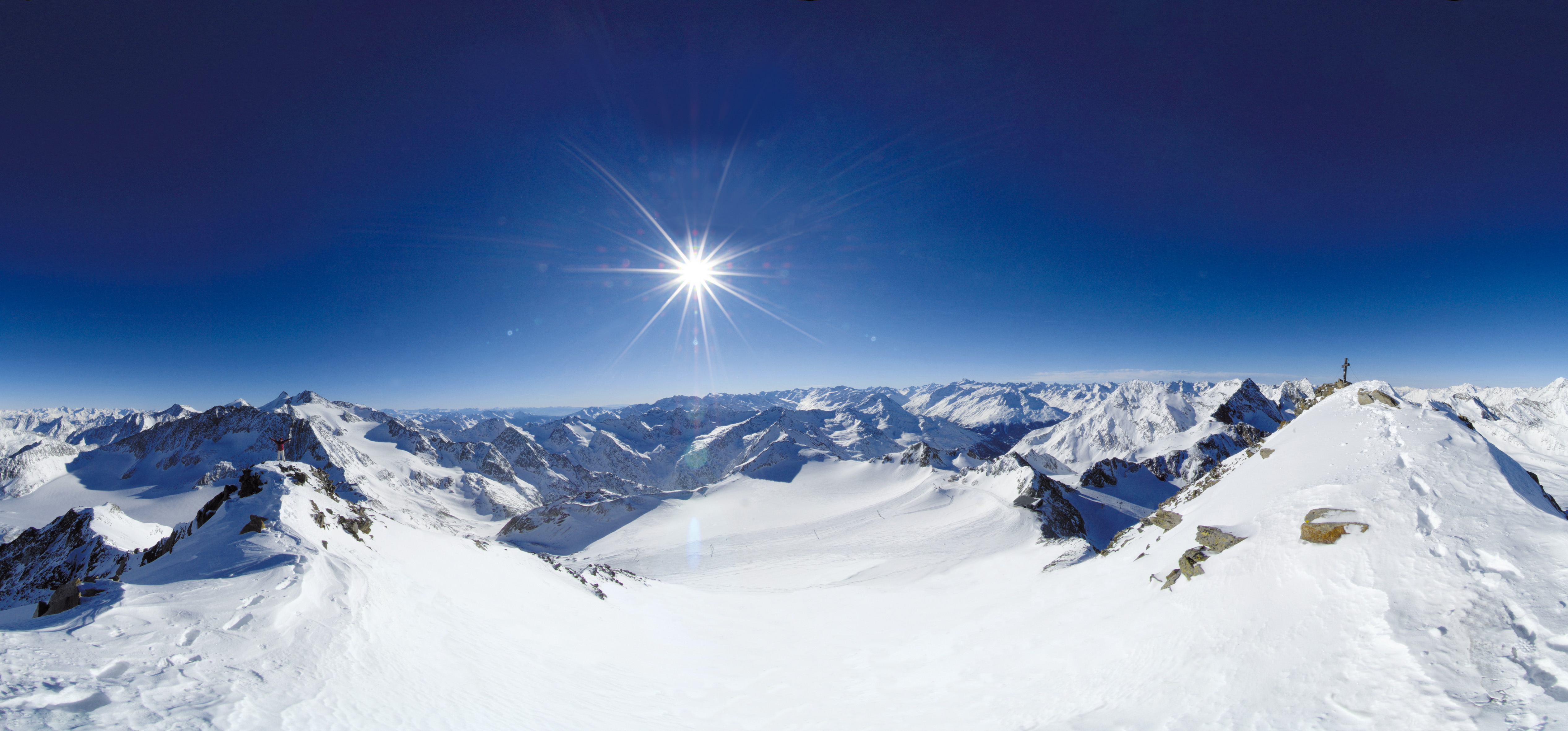 Beeindruckendes Panorama - Stubaier Gletscher. Ausblick von der Schaufelspitze